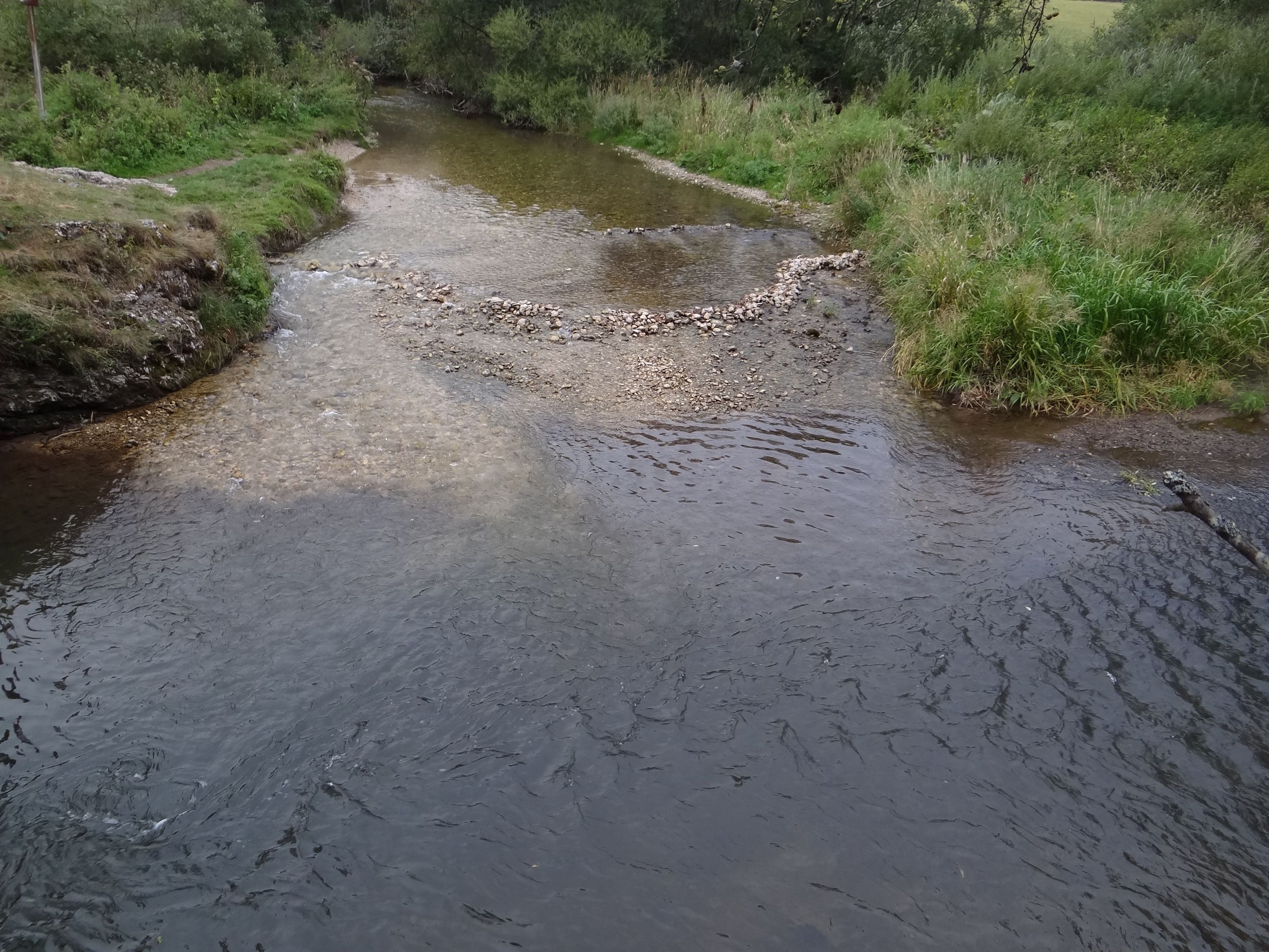 Veľká Biela voda przy ujściu do Hornadu